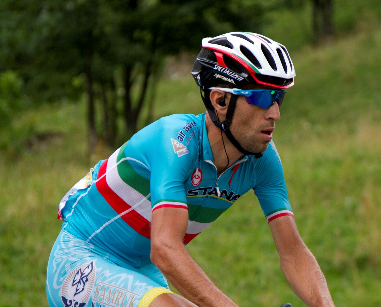 166 nibali